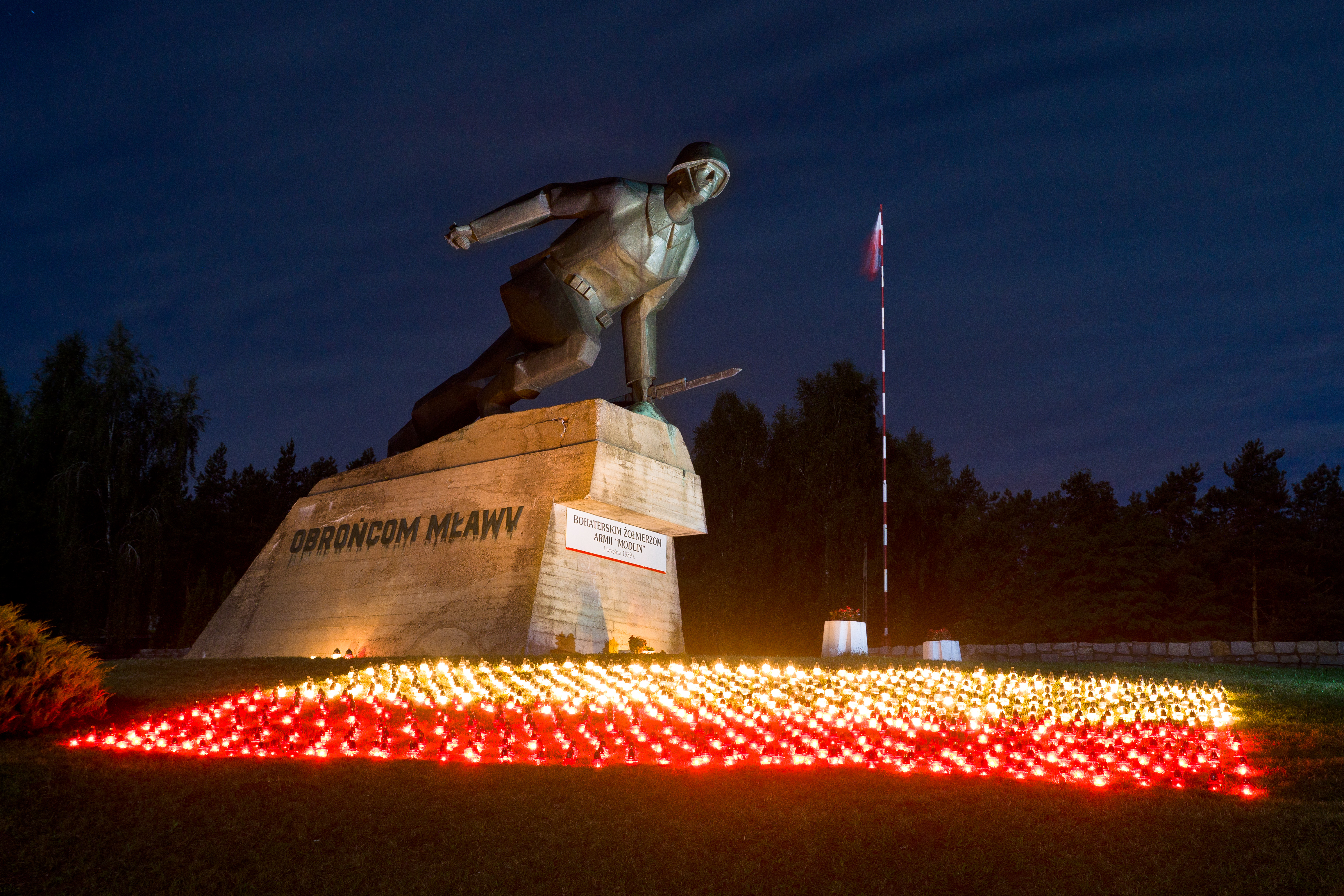 Znicze pod Pomnikiem Piechura w Uniszkach Zawadzkich upamiętniające 864 ofiar Bitwy pod Mławą. V rekonstrukcja Bitwy pod Mławą, 1. września 2012.